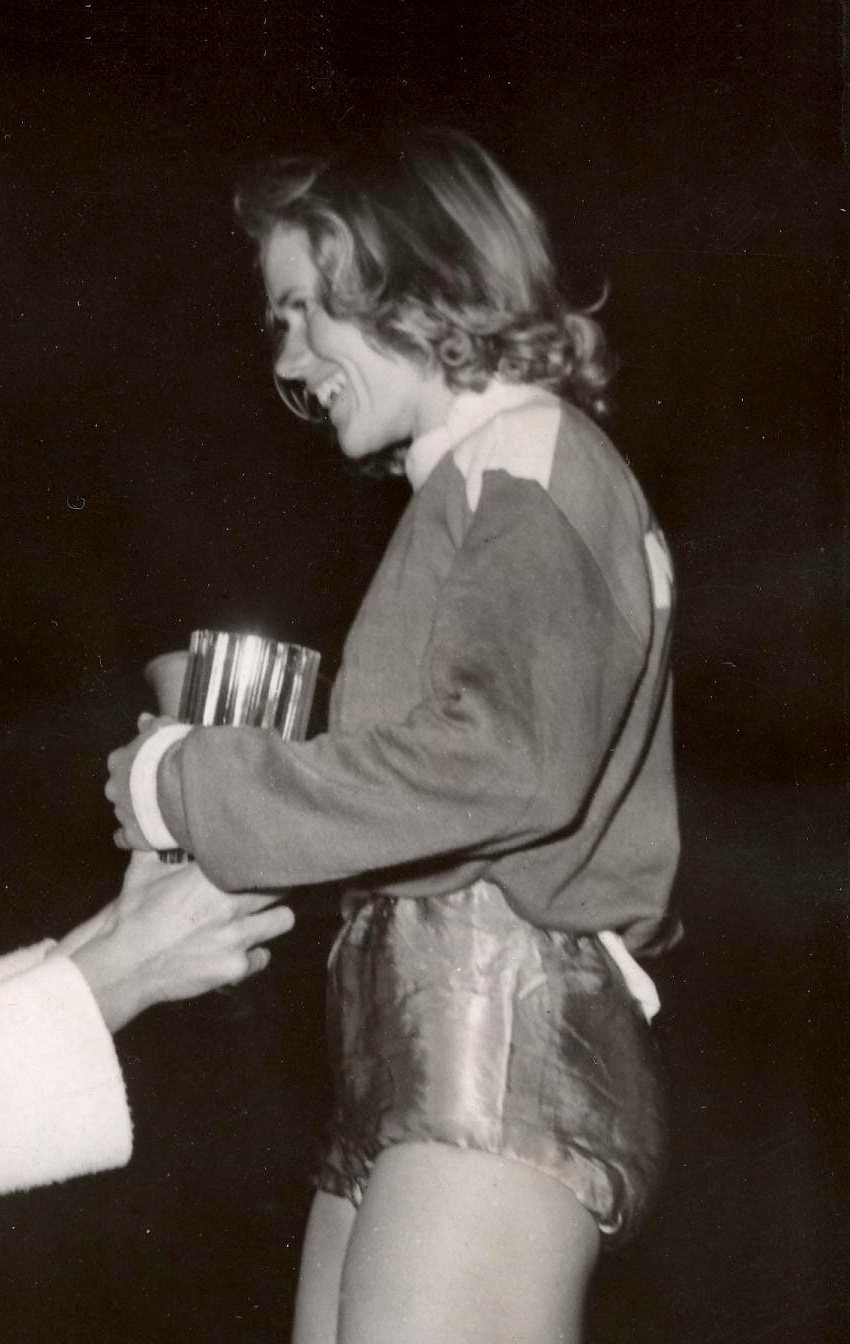 Anna Larsson